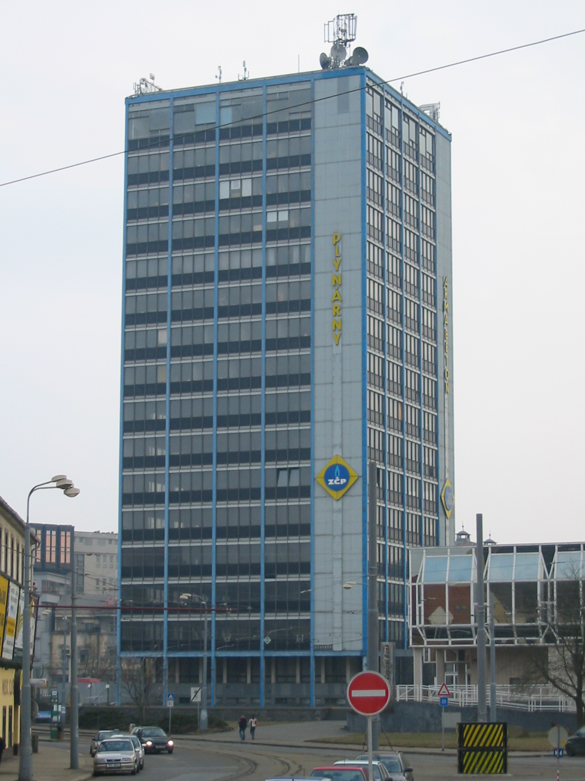 Business Center Bohemia, Pilsen, Czech Republic